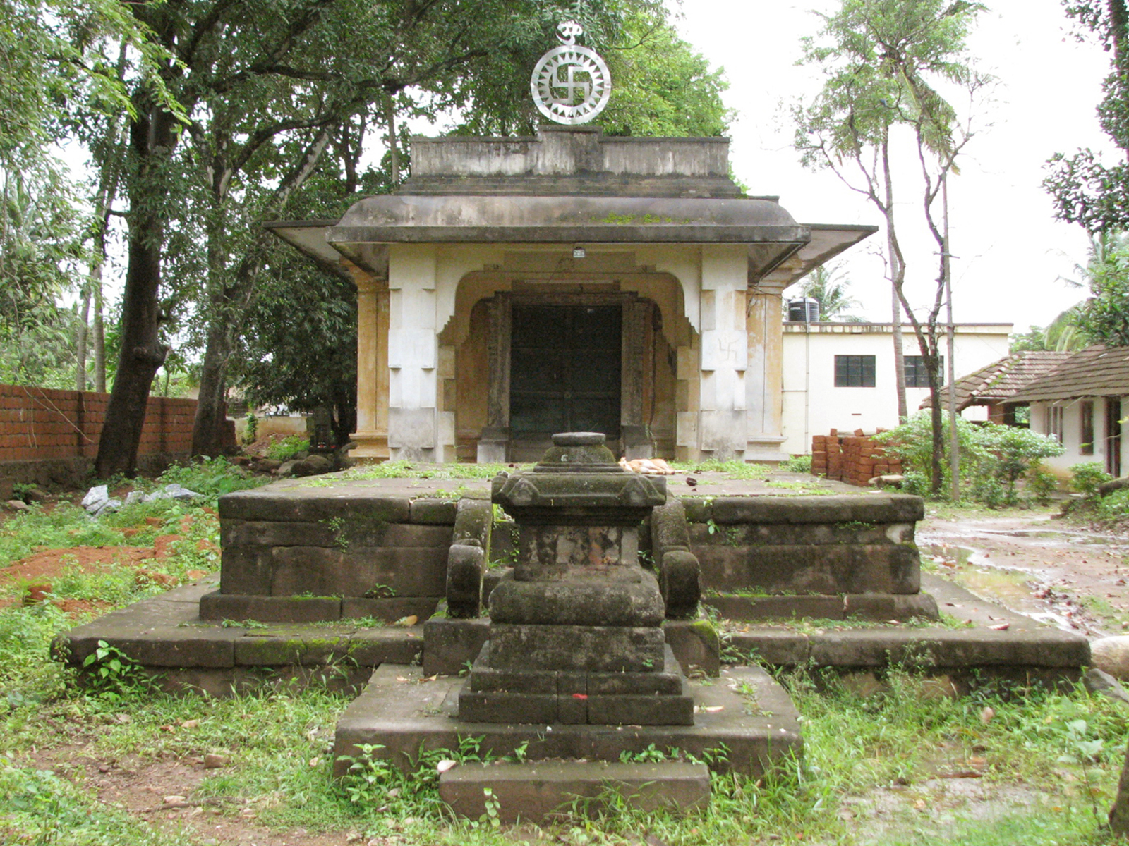 പകർപ്പവകാശ വിവരങ്ങൾ